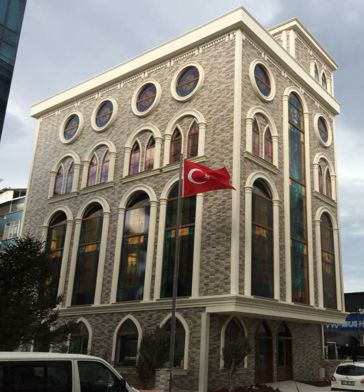 Samsun Protestan Kilisesi